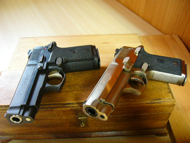 Pistolet FIRESTAR M43 (Star Bonifacio Echeverria S.A.)